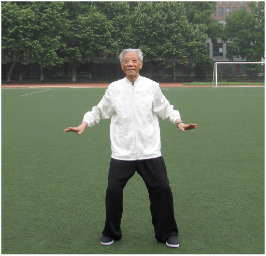 Abschnitt 8: Sieben Mal rütteln und hundert Krankheiten vertreiben